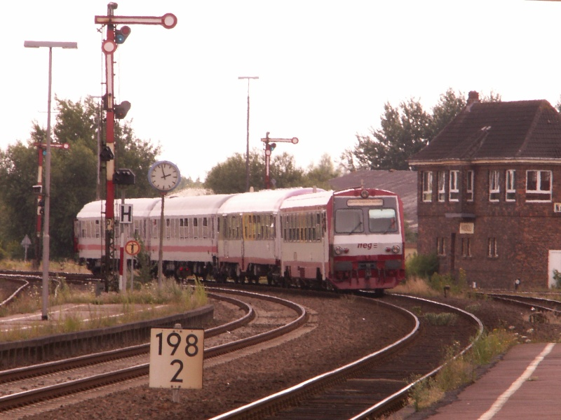 neg Niebüll